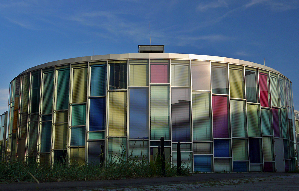 Adlershof Photonik-Zentrum